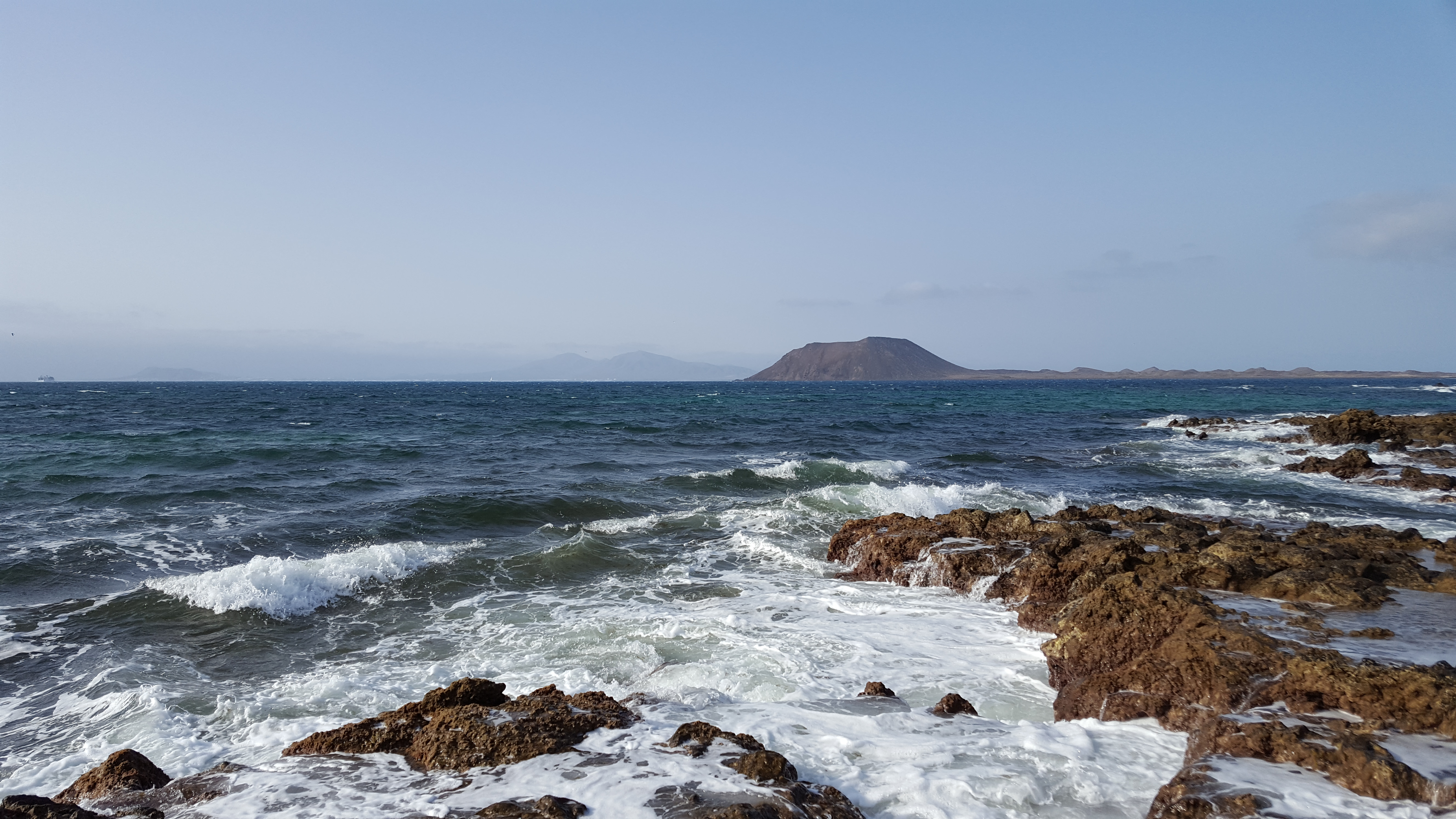 Isla de Lobos vista desde Fuerteventura.